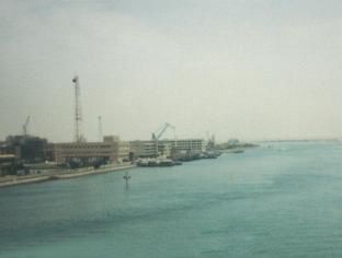 Suez in may 1982